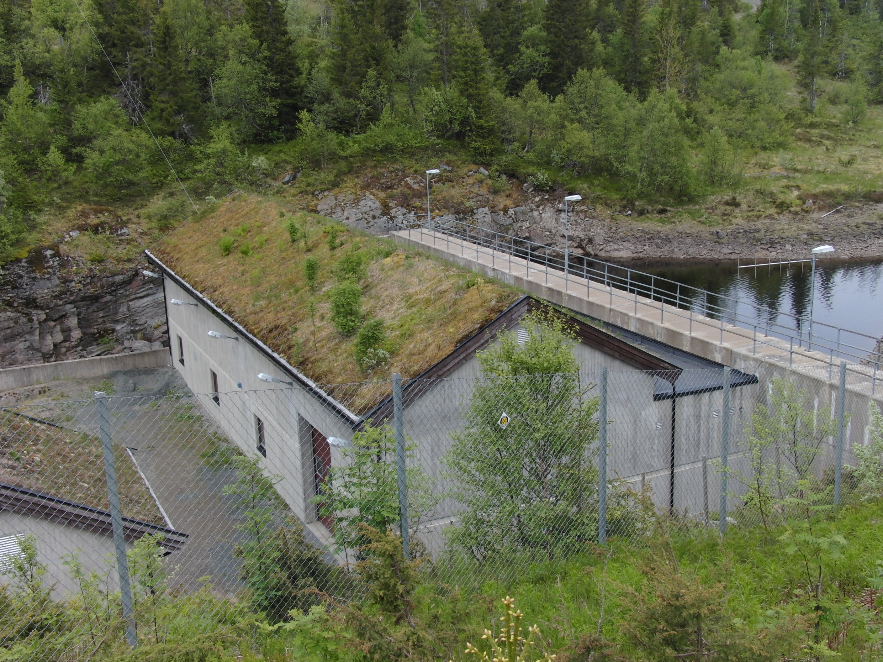 Buavatn pumpestasjon